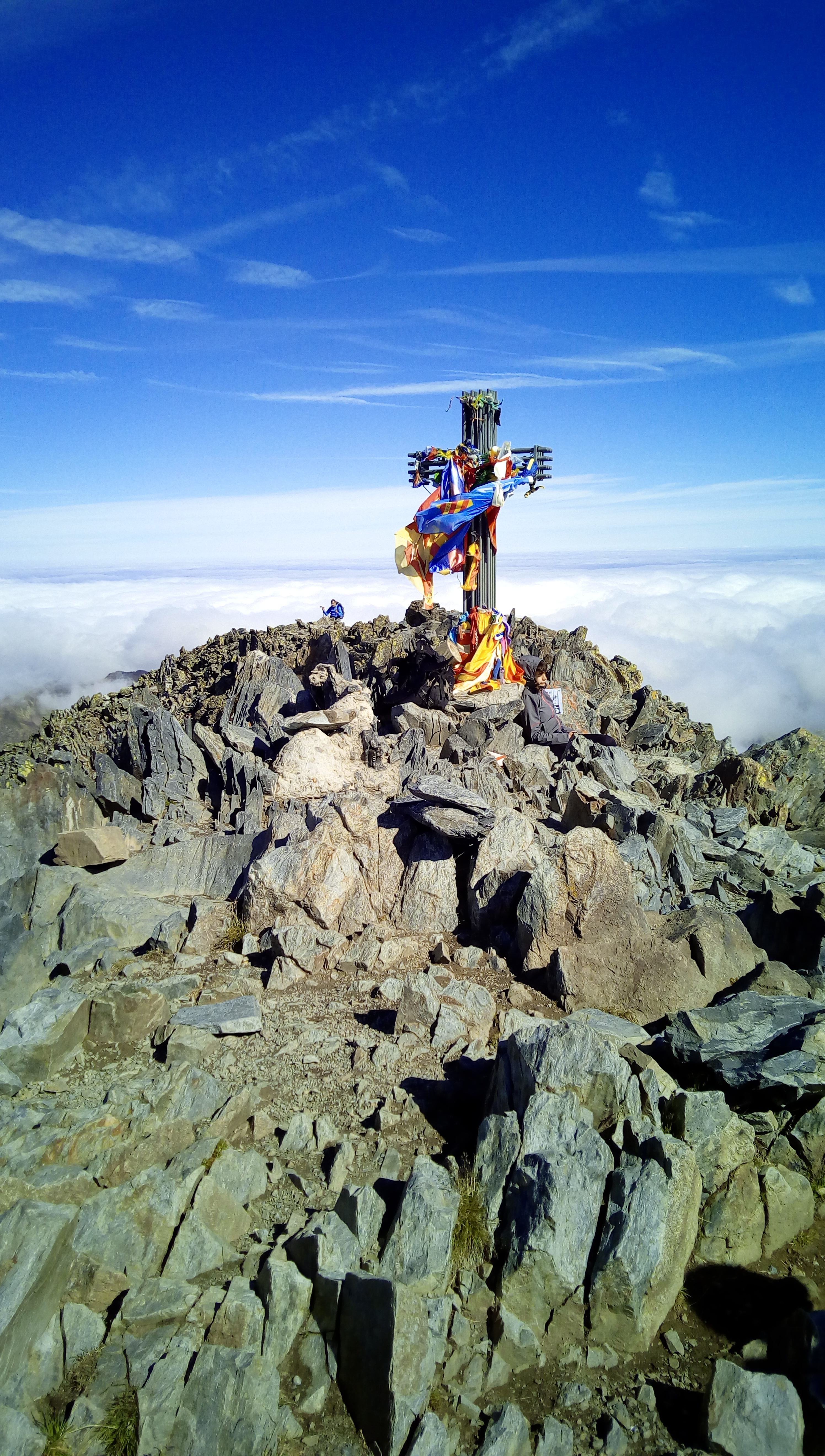 Fotografia del cim de la Pica d'Estats